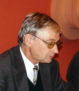 Prof. Sławomir Tumański, Polish scientist